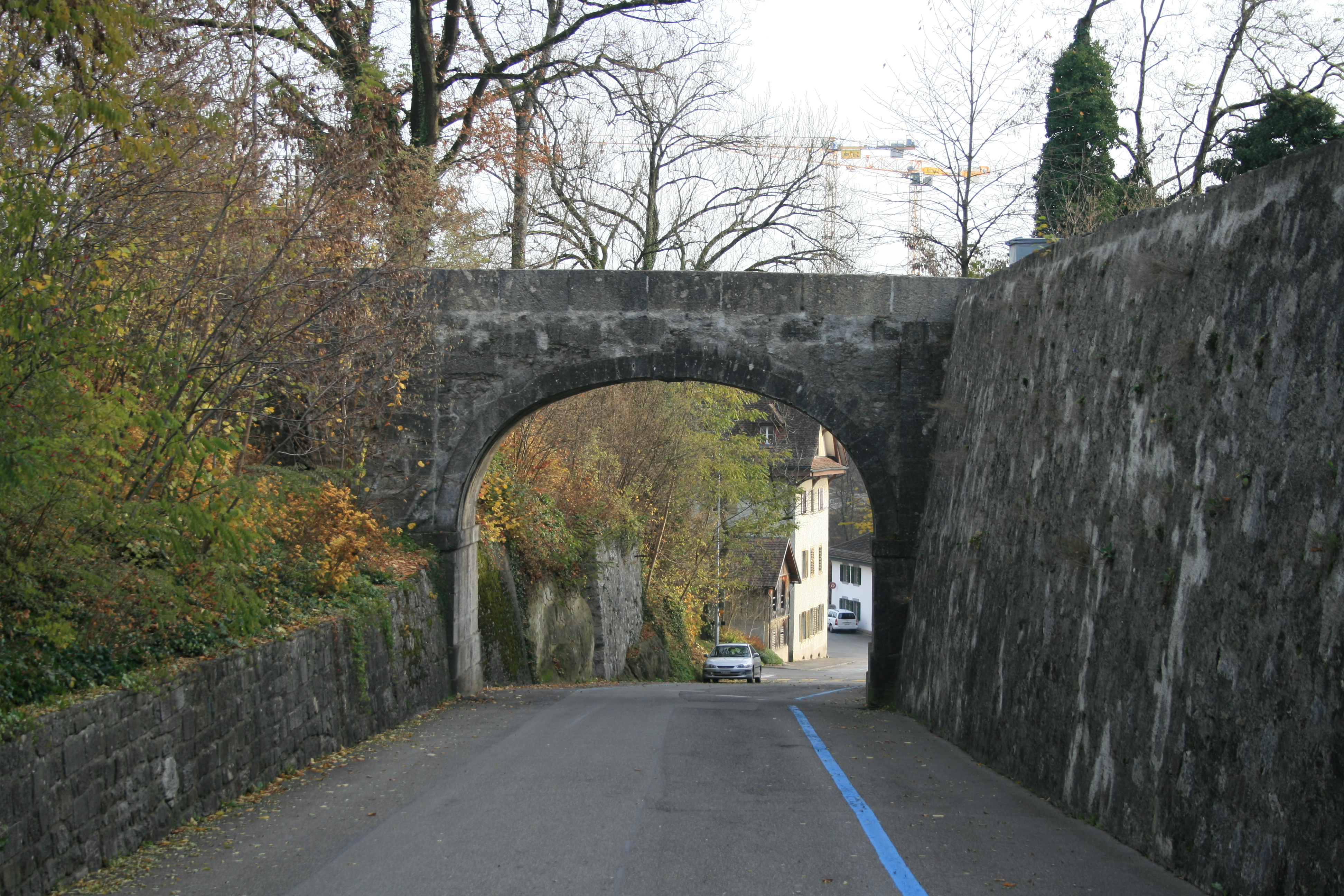 Fussgängersteg Kanzelrain, Wettingen